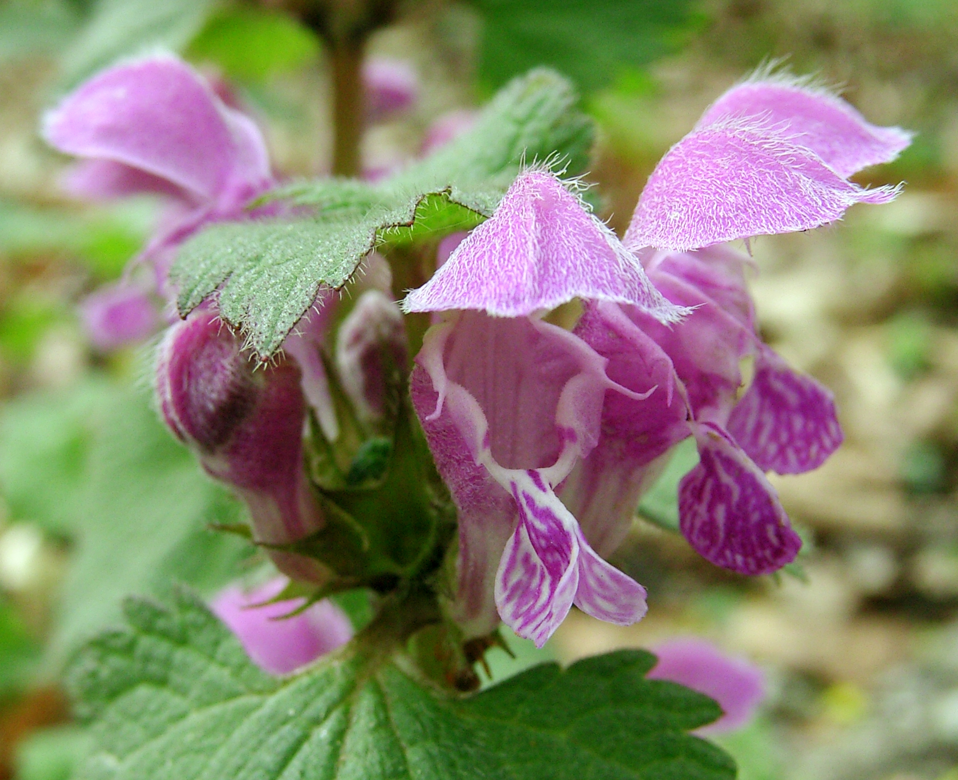 Beschreibung: gefleckte Taubnessel (Lamium maculatum) Aufnahmedatum: 22. April 2007 Fotograf: ArtMechanic